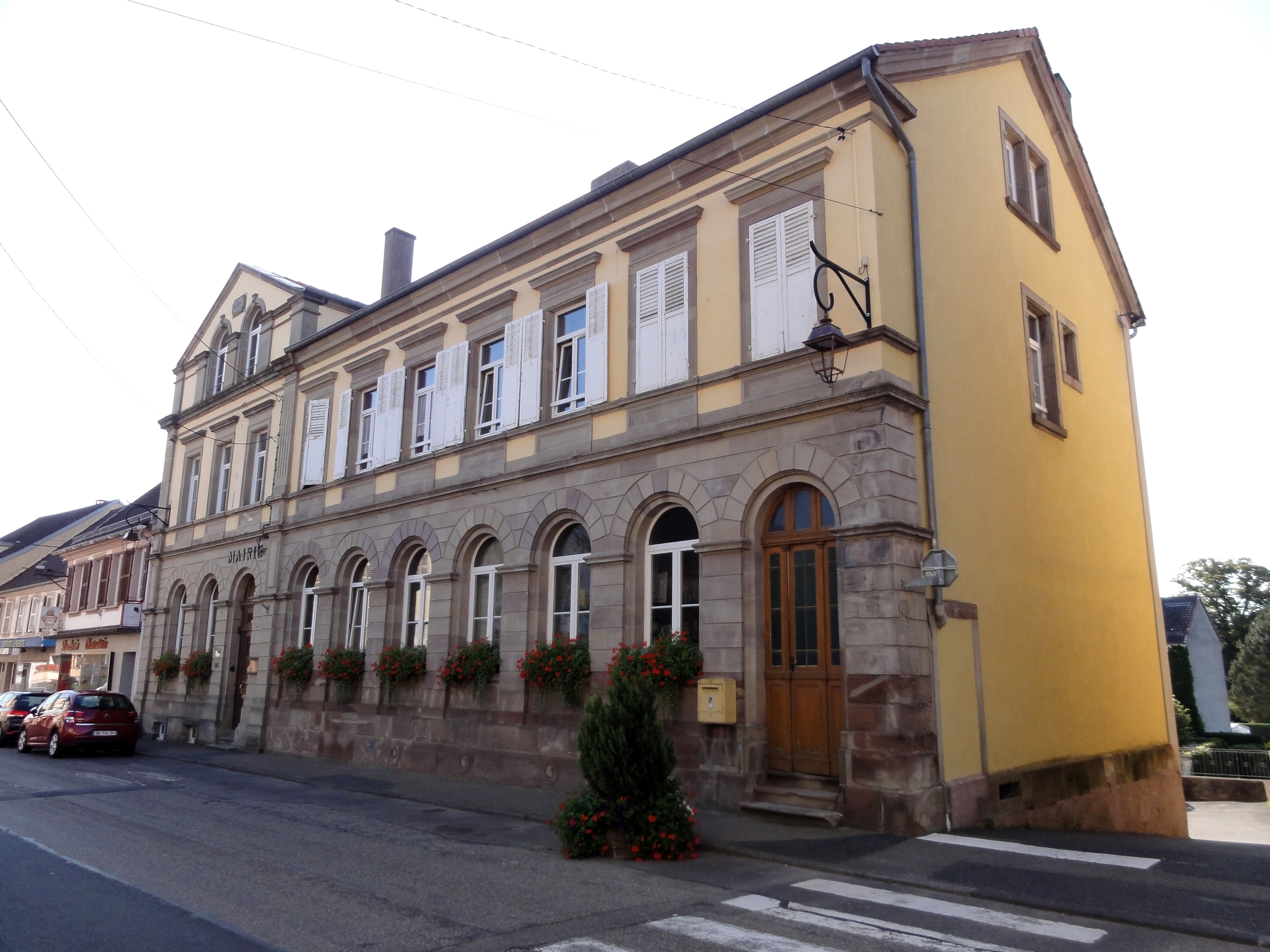 Alsace, Bas-Rhin, Drulingen, Mairie-école (XXe), 10 rue du Général-Leclerc. .